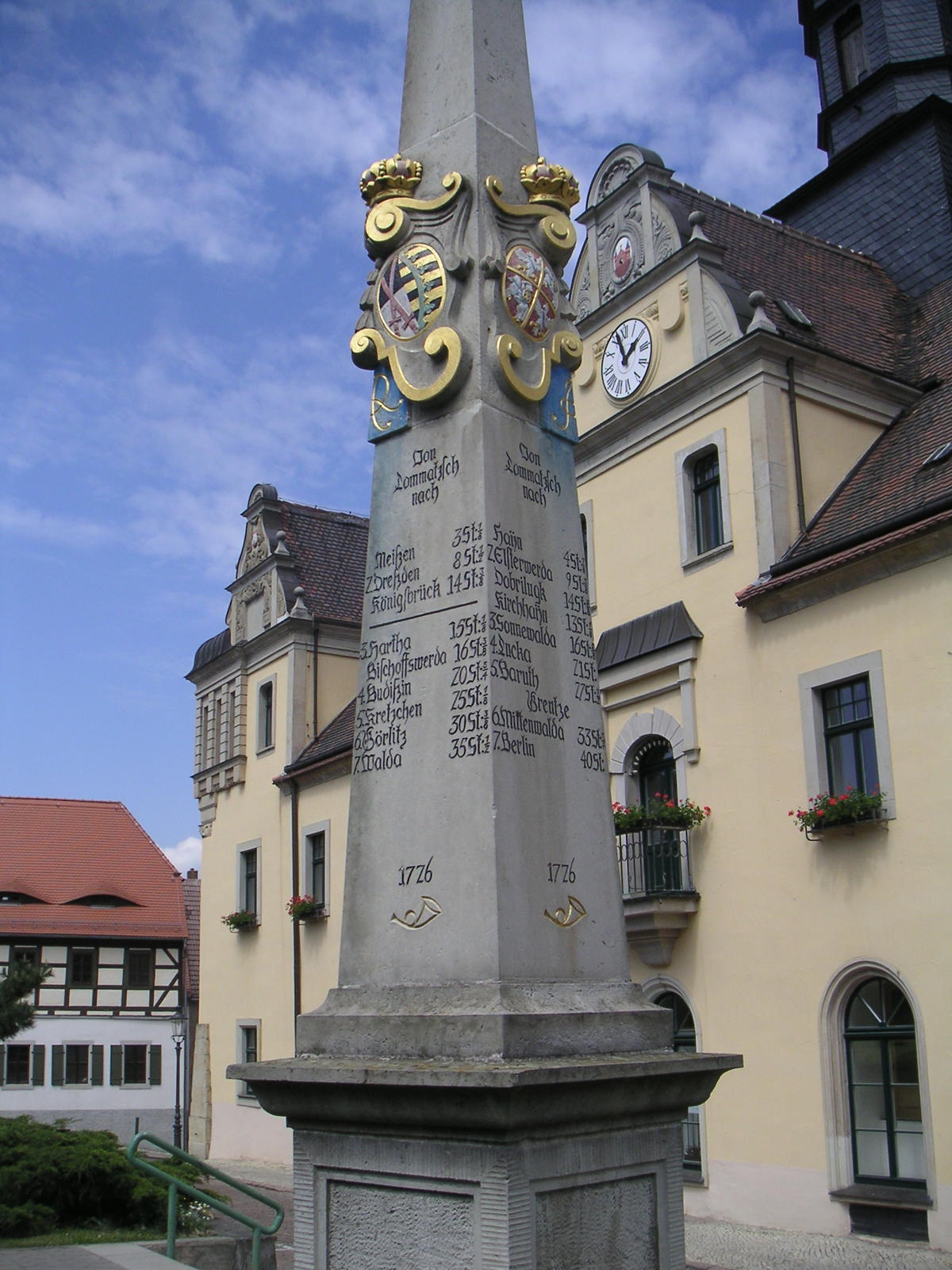 Distanzangaben an der kursächsische Distanzsäule von 1726 in Lommatzsch